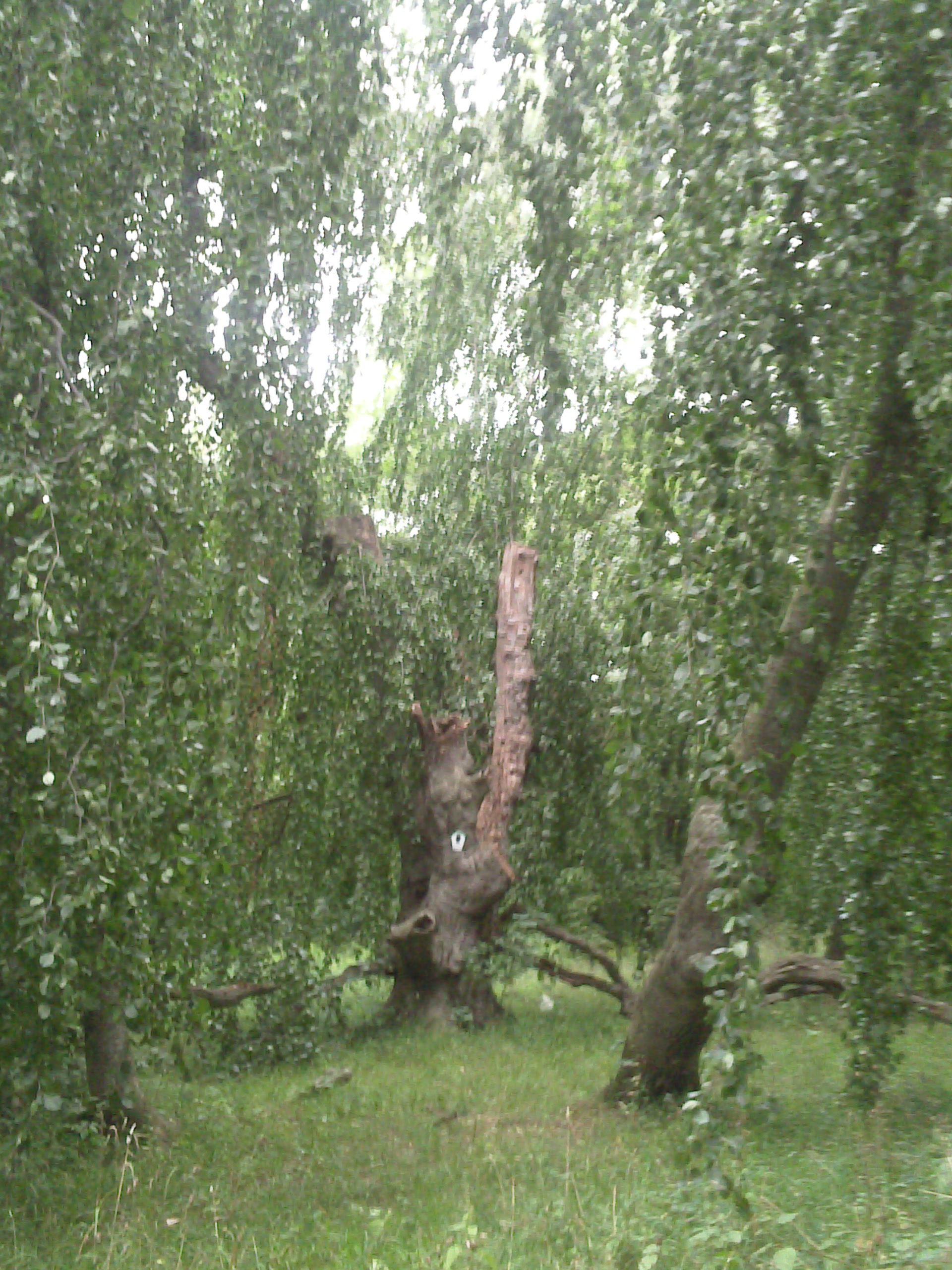 Hängebuche im Dehlitzer Park